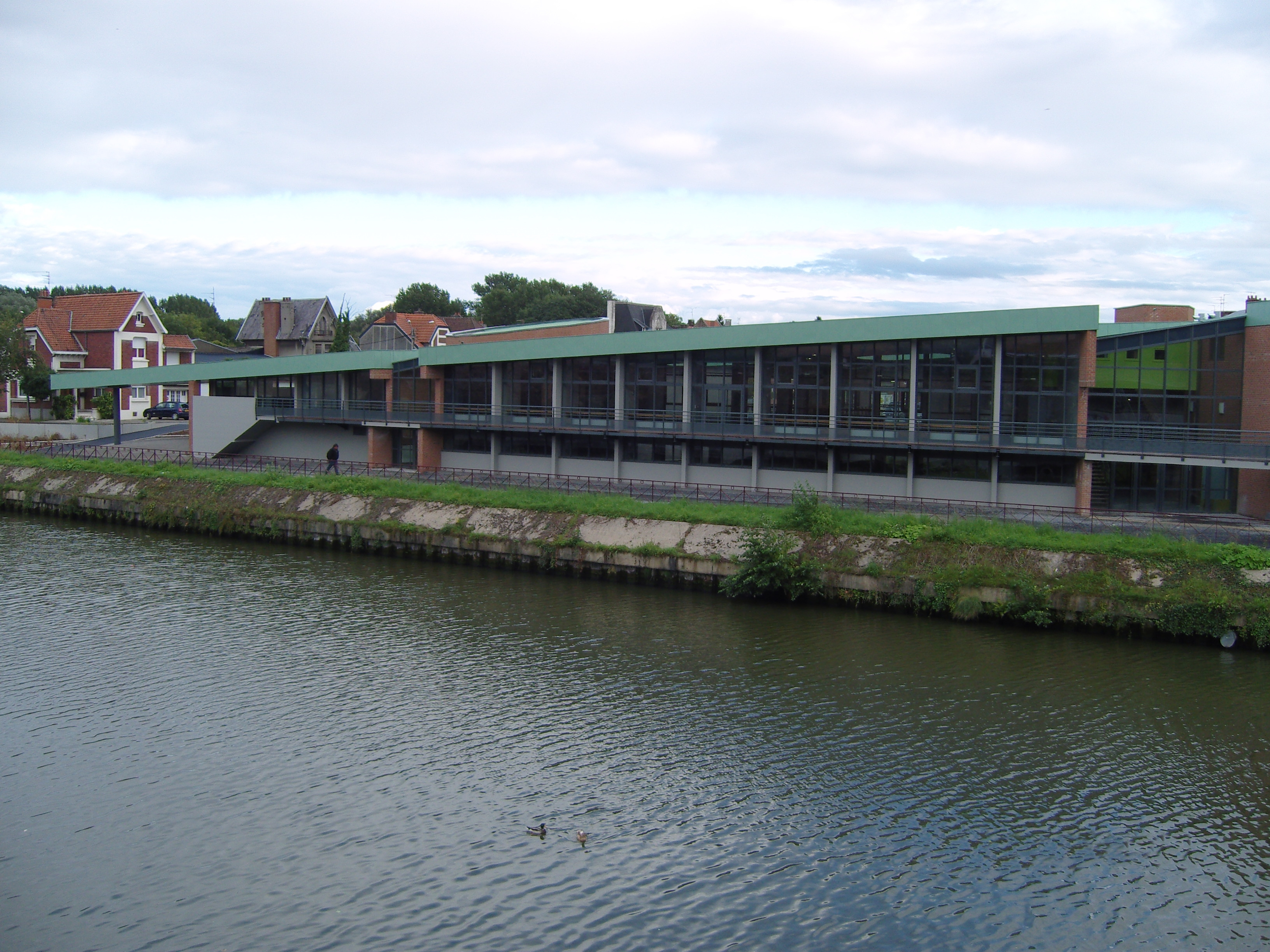 Bouchain l'Escaut